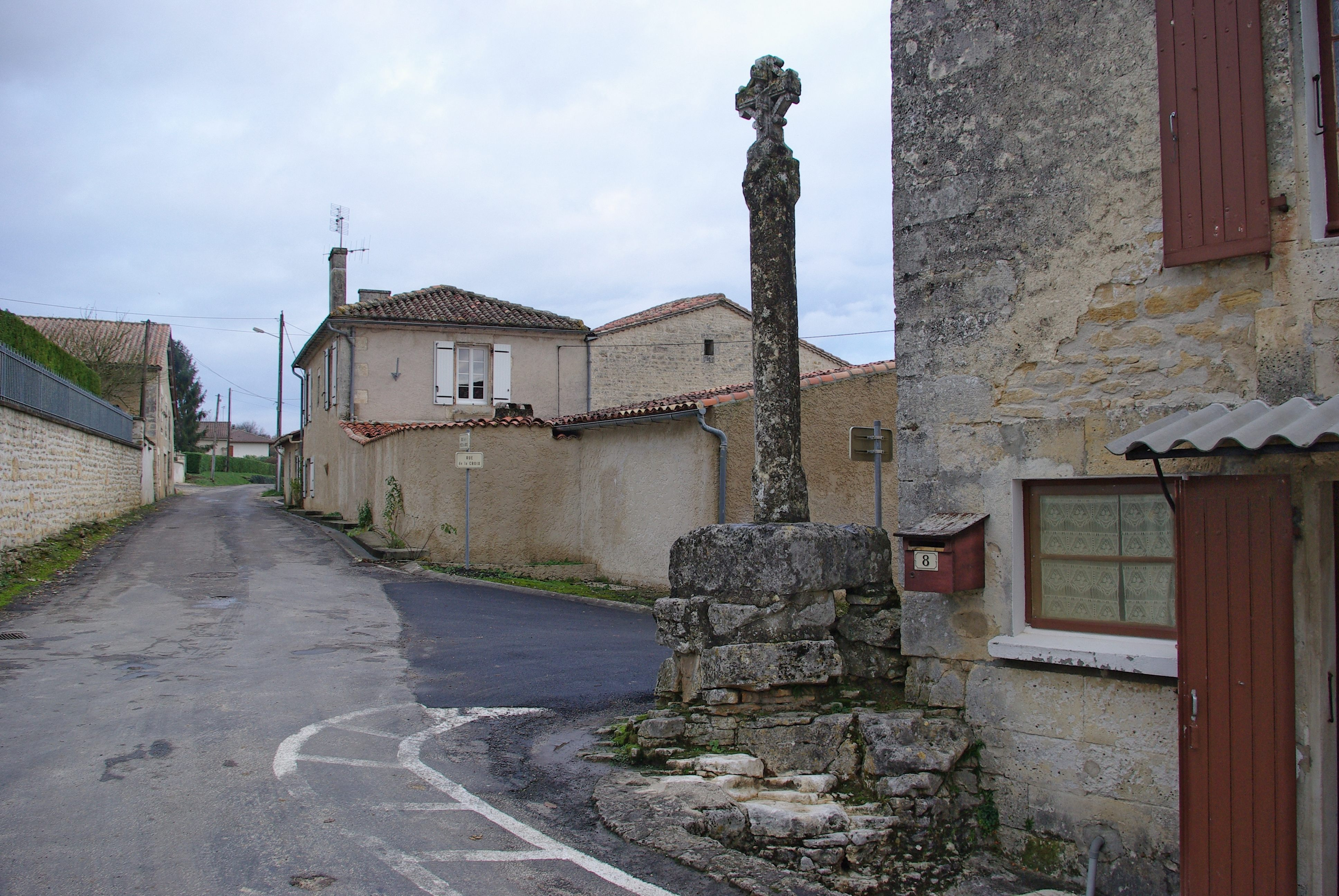 Croix de carrefour située au hameau de Gersac, commune de Mouthiers, Charente, France..